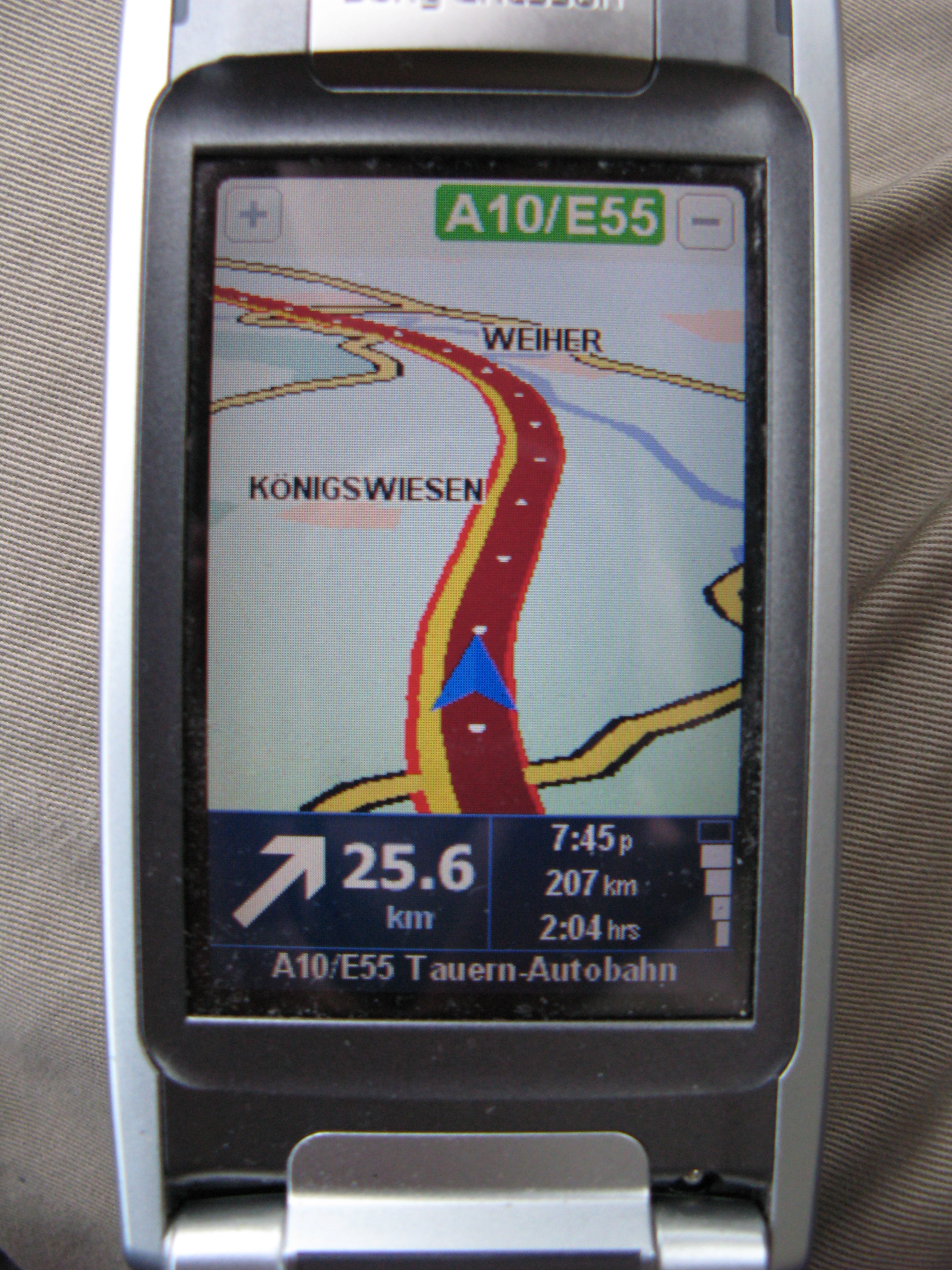 ТомТом навигација на мобилном телефону.